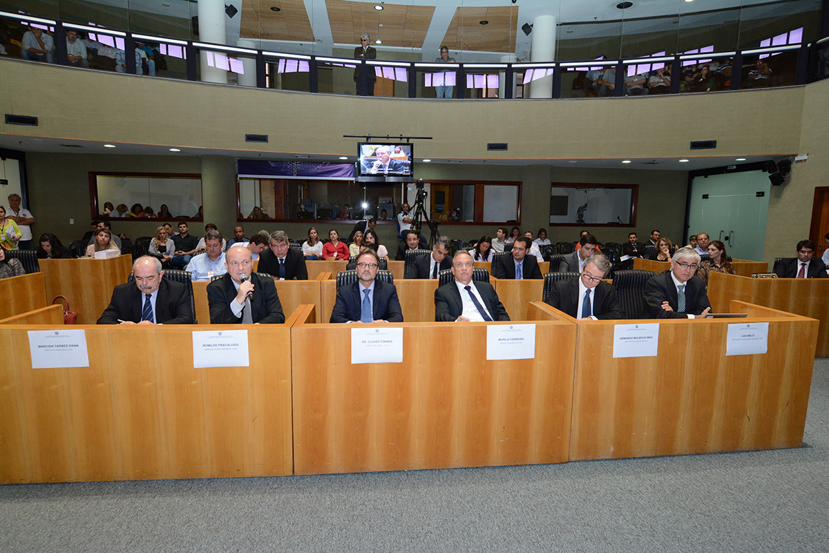 Foto: Tonico